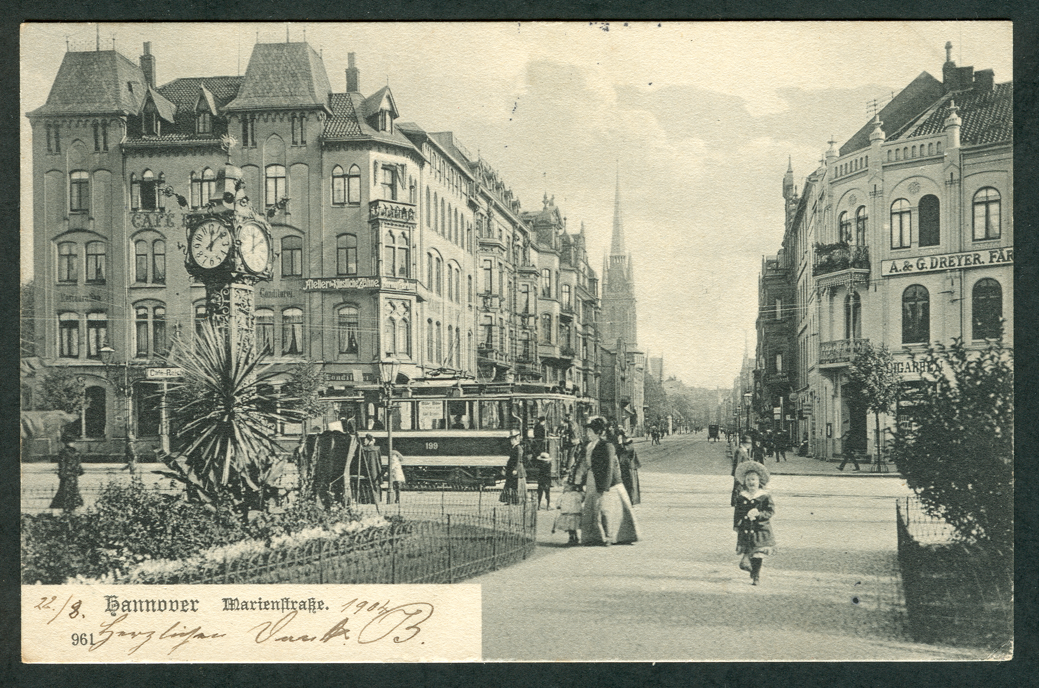 Bildmotiv der Ansichtspostkarte von Karl Friedrich Wunder